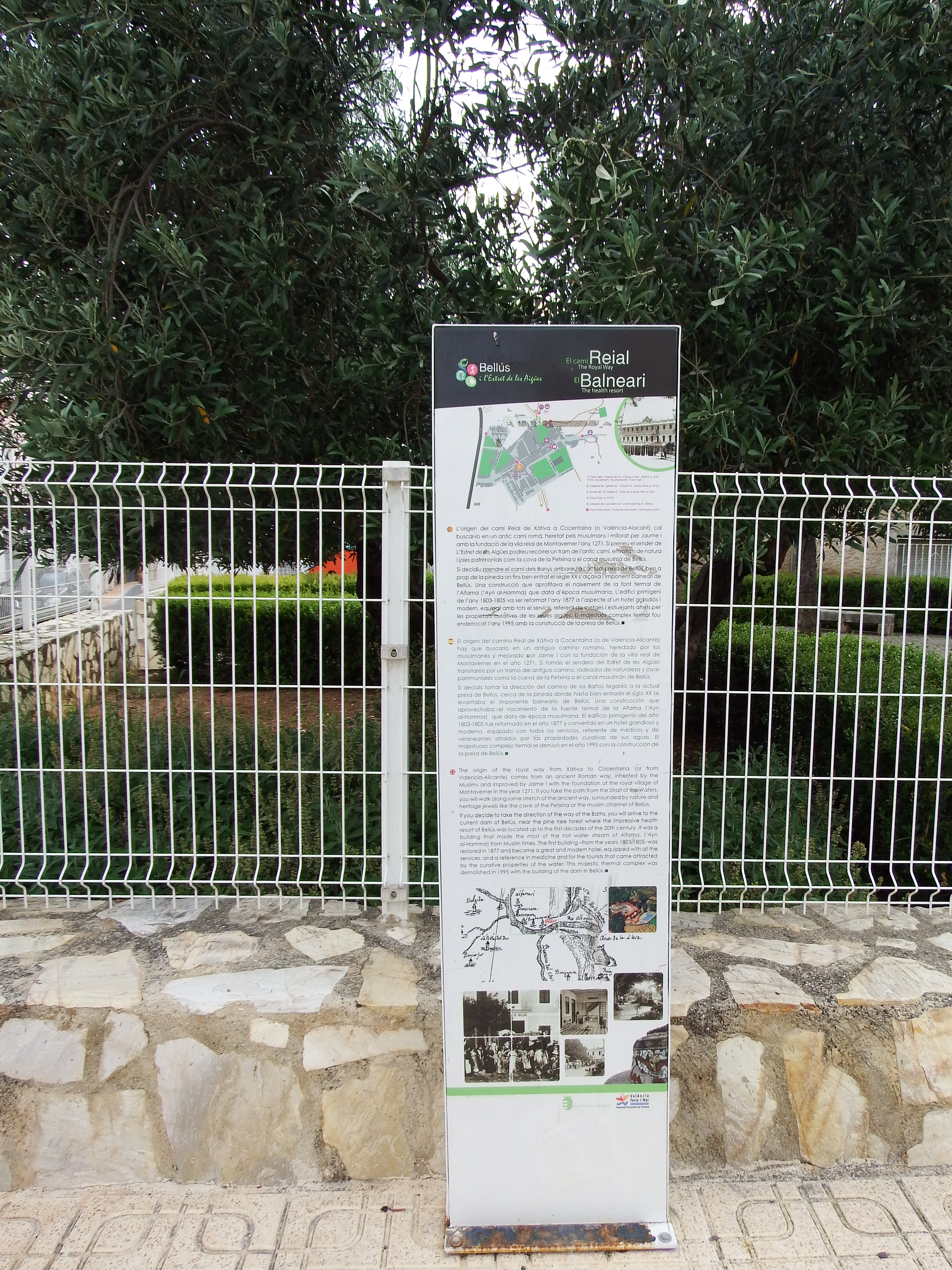 Imágenes de Bellús